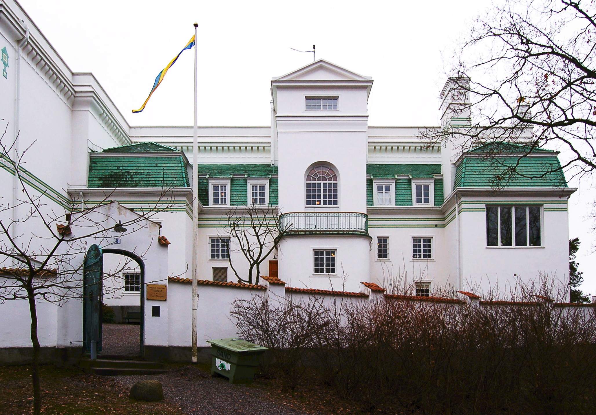 Thielska galleriet från entresidan.